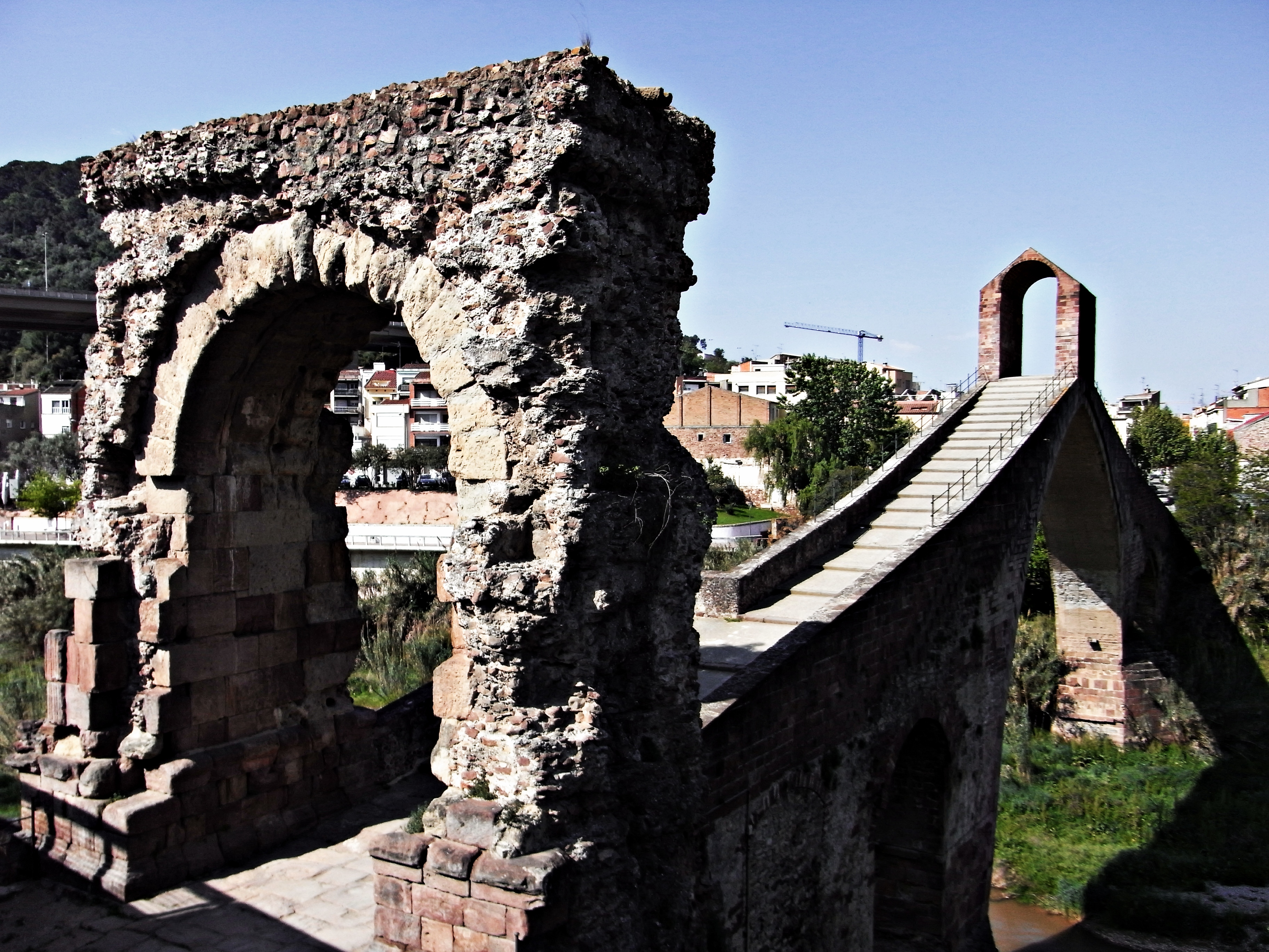 Arc romà d'accés des de Castellbisbal al Pont del Diable de Martorell.